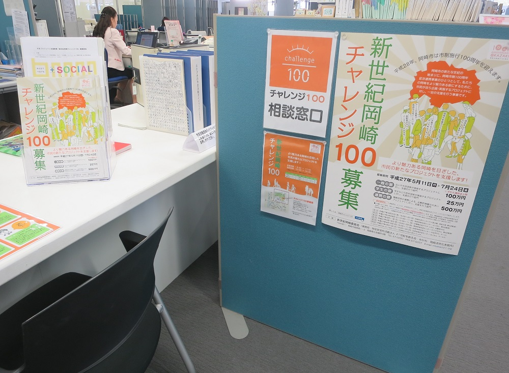 新世紀岡崎チャレンジ100事務局